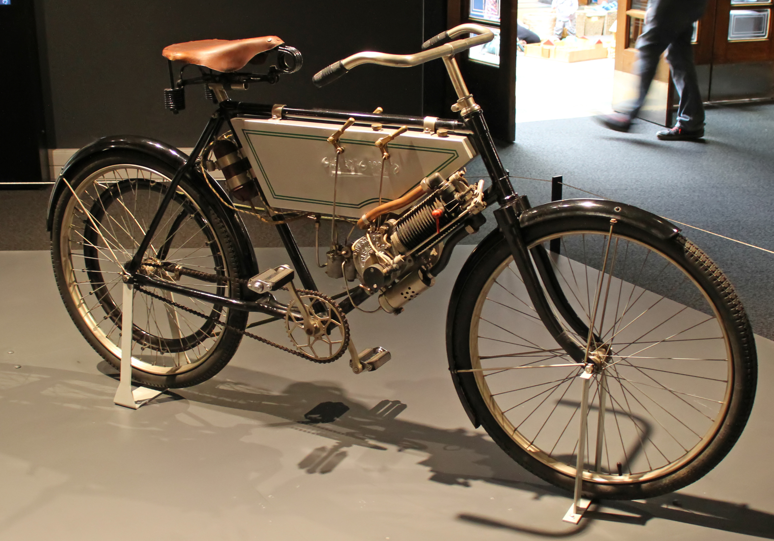 Clement-Garrard motorcycle